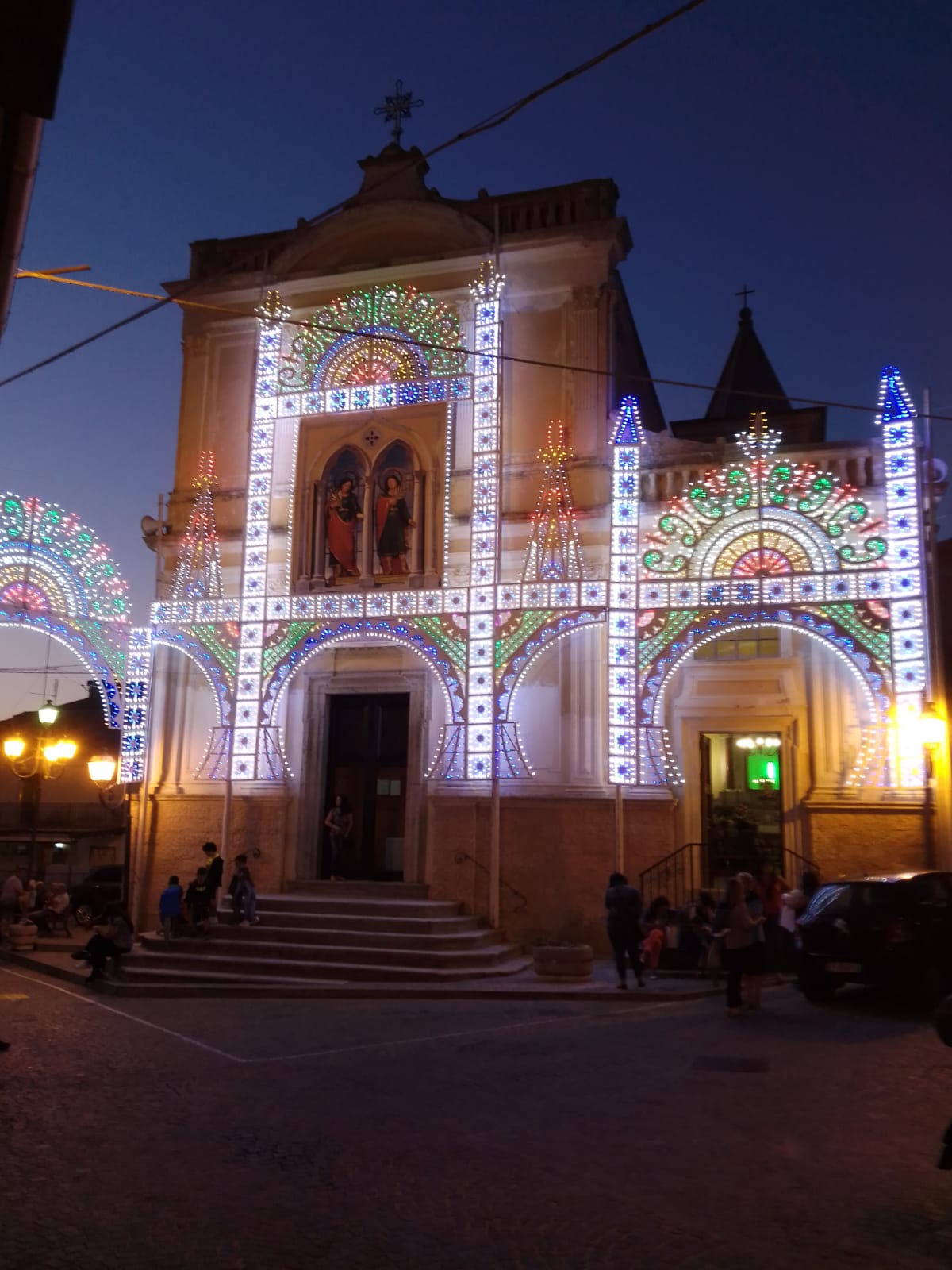 Chiesa di San Pietro (situata a Brattirò) allestita per la cerimonia dei SS. Cosma e Damiano nel 2019